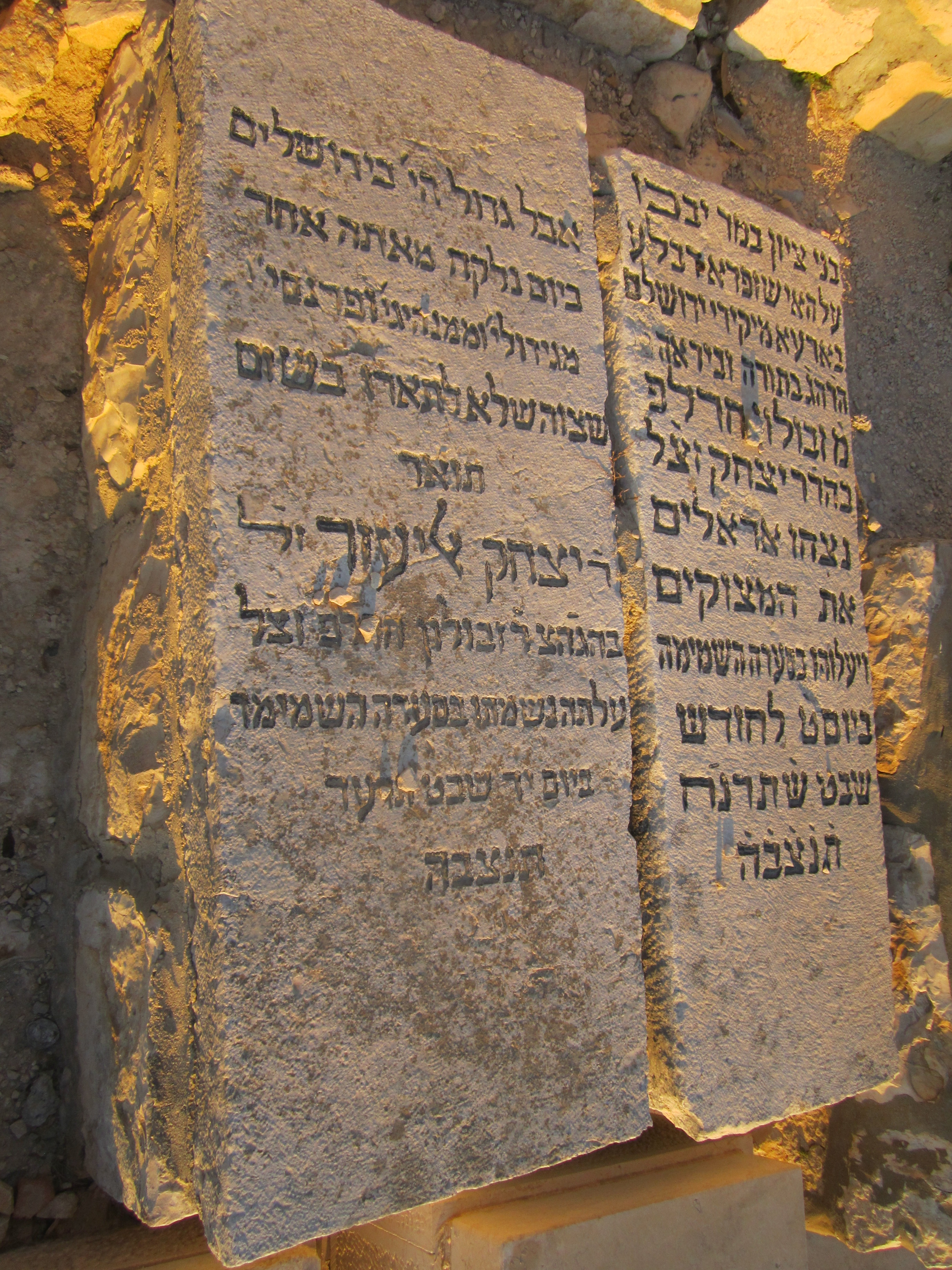 קברי הרב זבולון ובנו הרב אליעזר חרל"פ בהר הזיתים